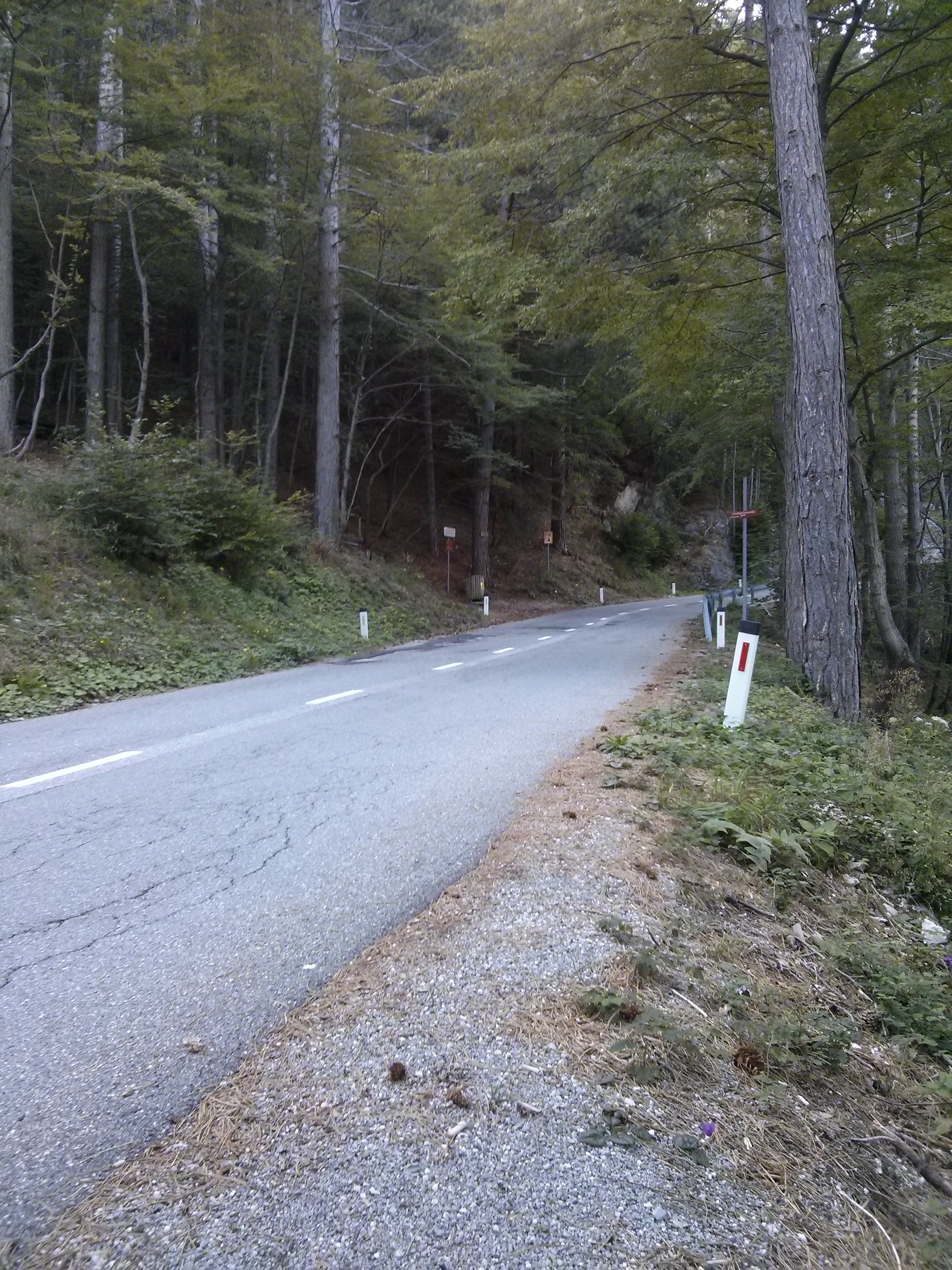 Aug 8, 2014 5_17_22 PM